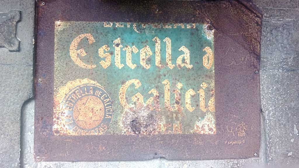 Antigo cartel publicitario metálico de Estrella Galicia na Graña, Ferrol.